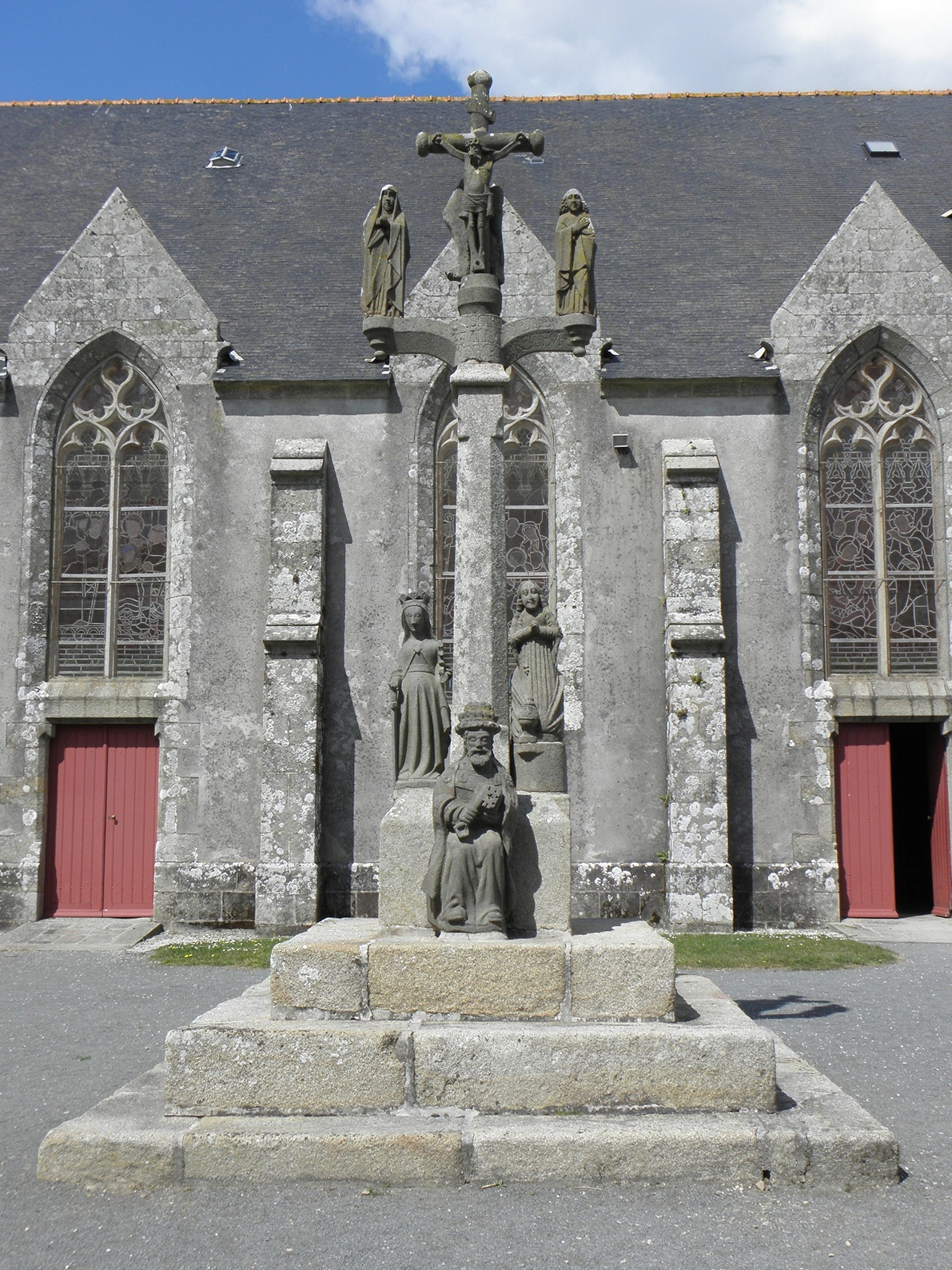 Calvaire de Sainte-Anne-la-Palud en Plonévez-Porzay (29).